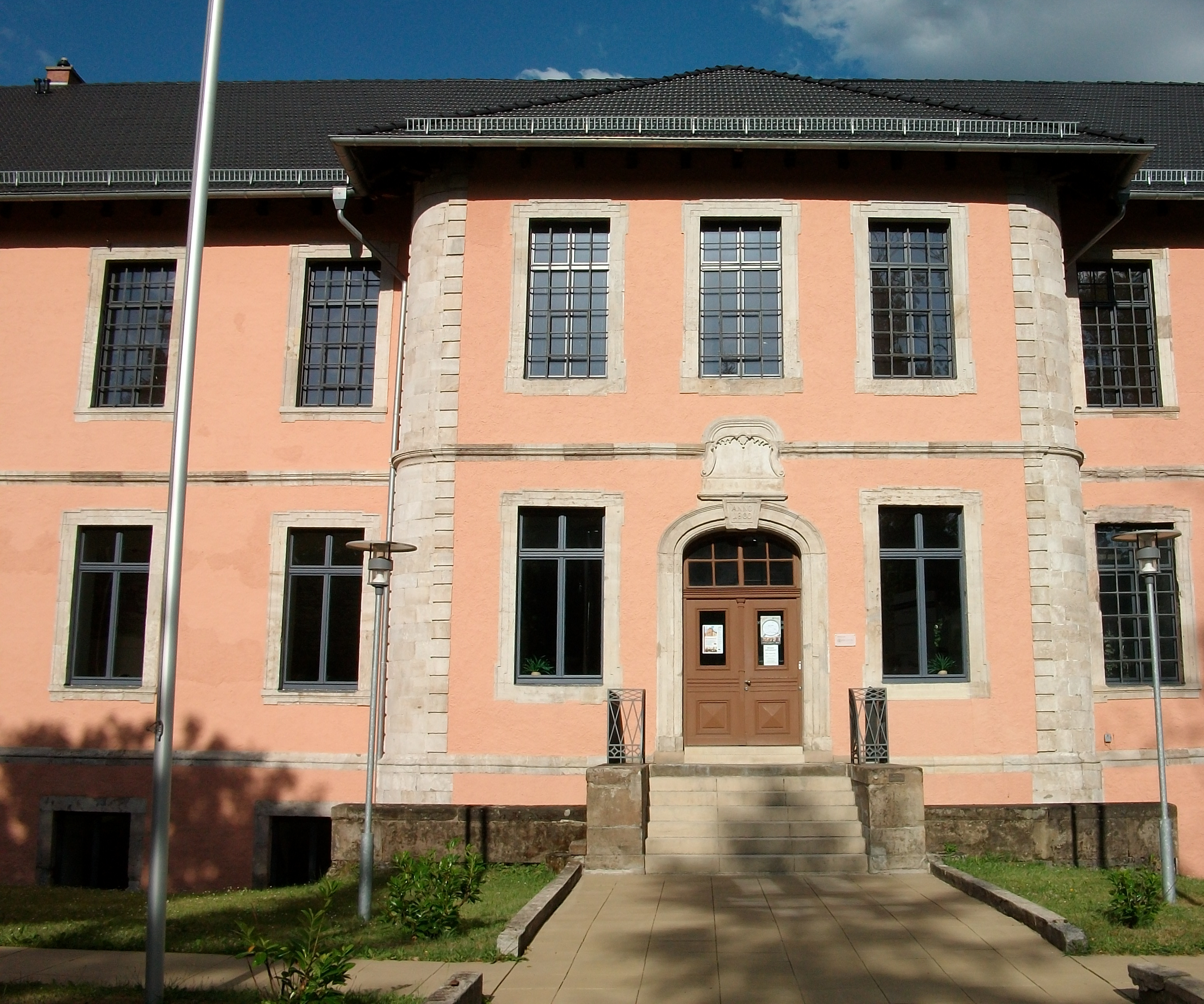 Eingang Kloster Bredelar, Marsberg-Bredelar (Germany)